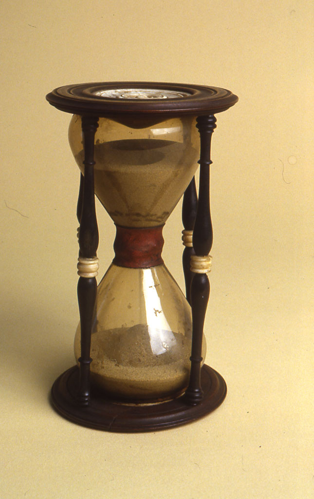 Orologio a sabbia con montatura in legno con quattro pilastrini a doppia colonna con giunto di avorio. Base con disco di avorio centrale con scanalature concentriche.